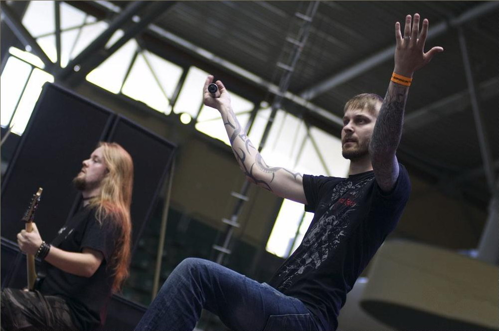 Mors Principium Est Live @ Earthshaker Fest - 07/2007 - Kreuth bei Amberg, Alemanha